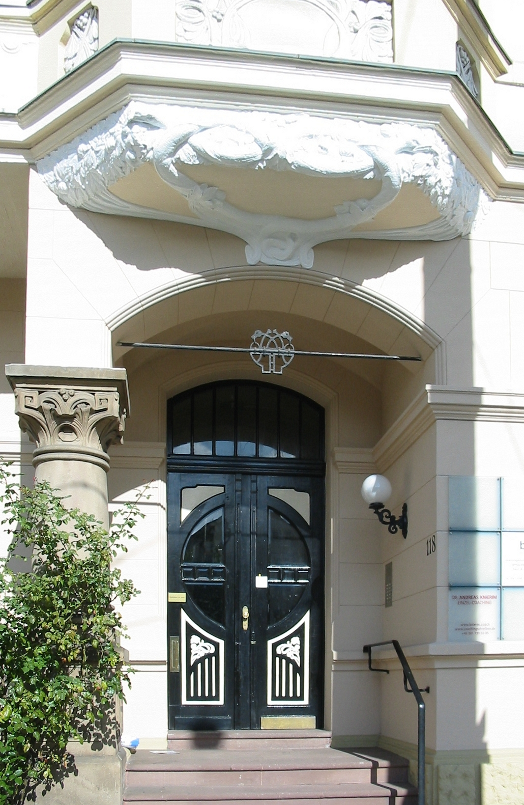 Haustür denkmalgeschütztes Haus Wilhelmshöher Allee 118 in Kassel